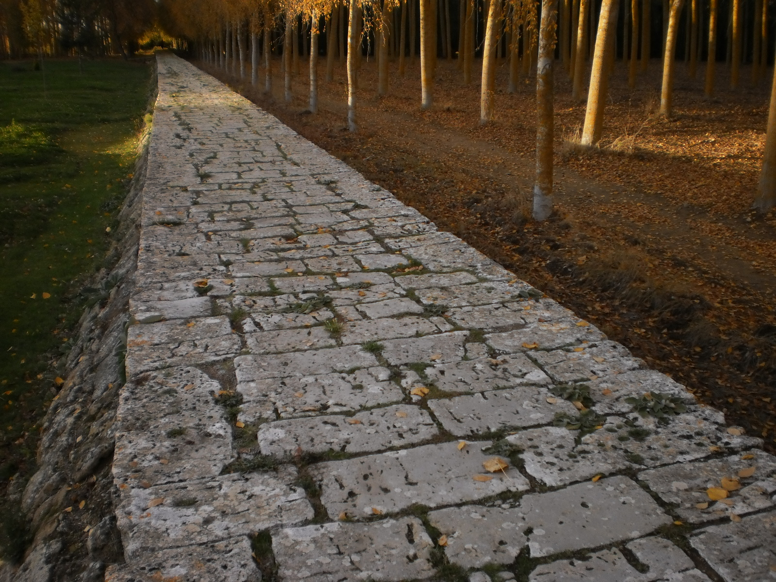 Calzada de Piedra de Carrión de los Condes